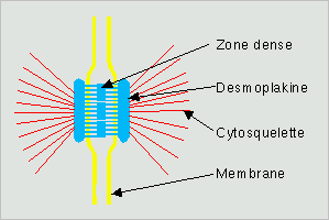 Description : schéma d'un desmosome Type : Schema Source : Auteur : L Delépine (fenkys) Copyright : Licence : GNU FDL L Delépine (fenkys)